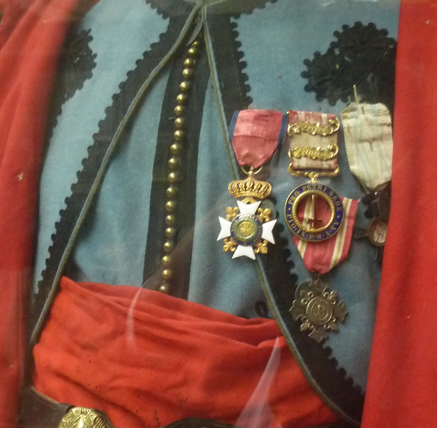 Koninklijk Legermuseum, historische zaal, medailles Pro Ecclesia et Pontifice